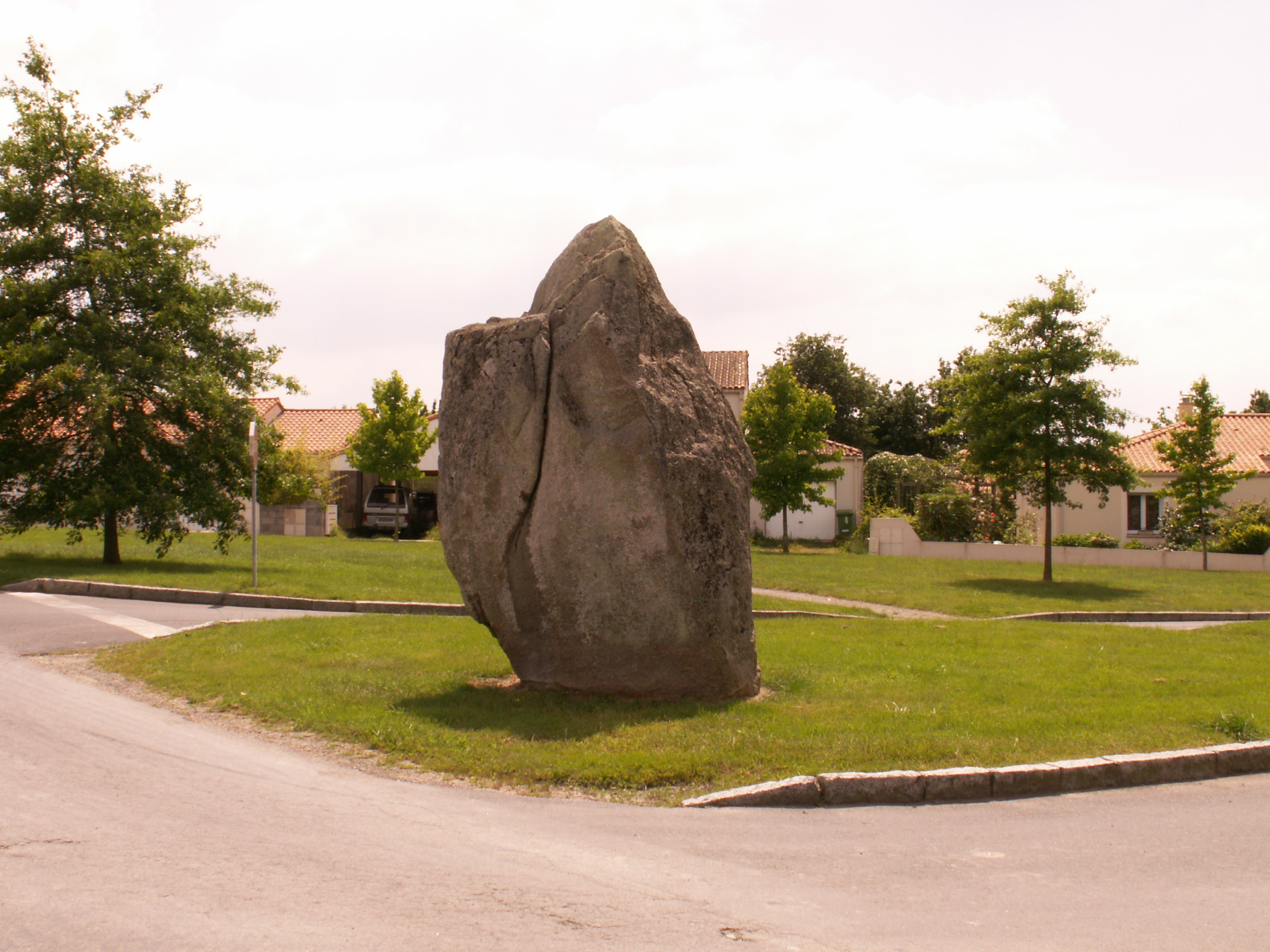 Menhir de Haute-Lande, (Inscrit, 1960) .